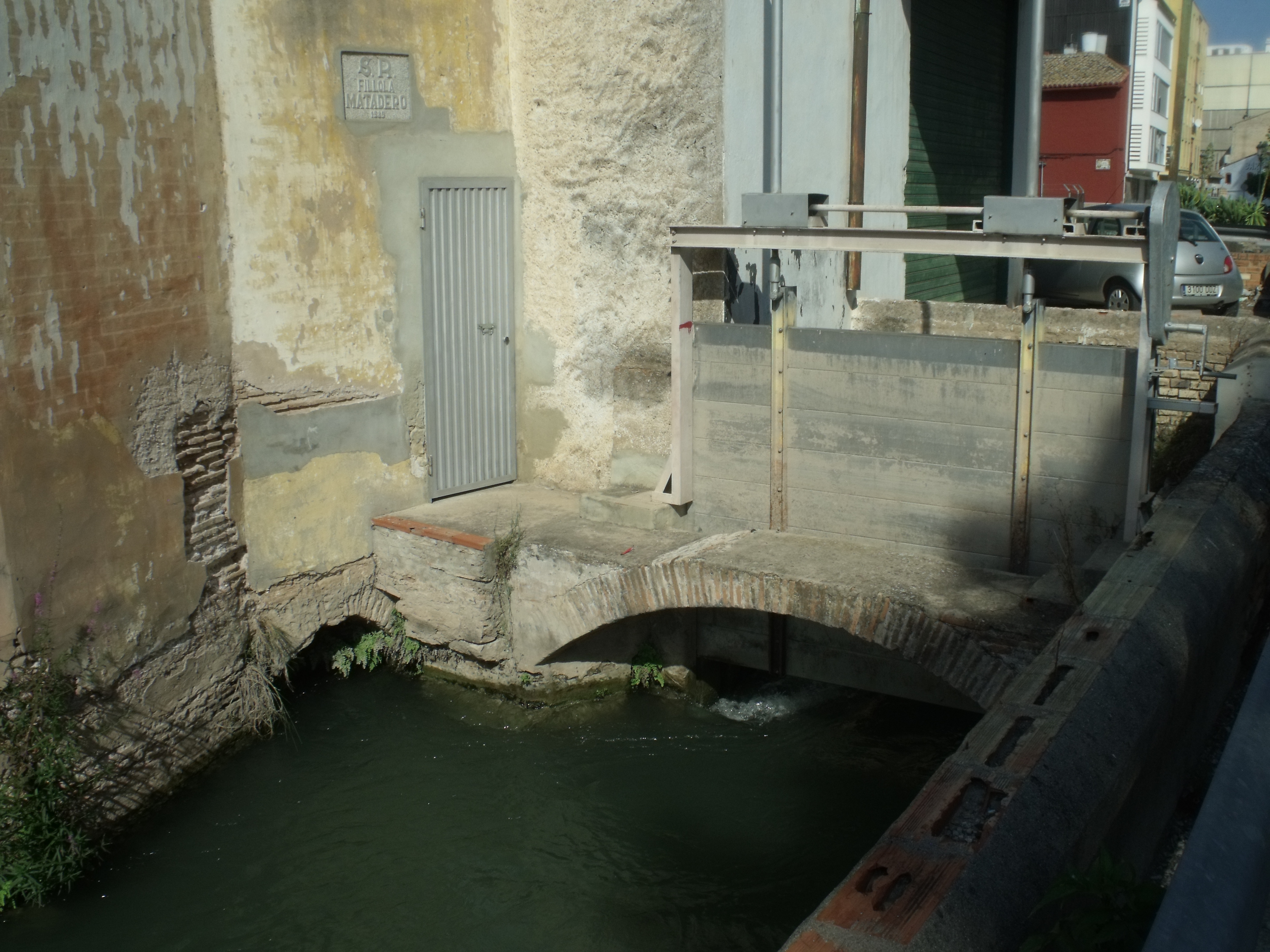 Acequia a su paso por Sueca